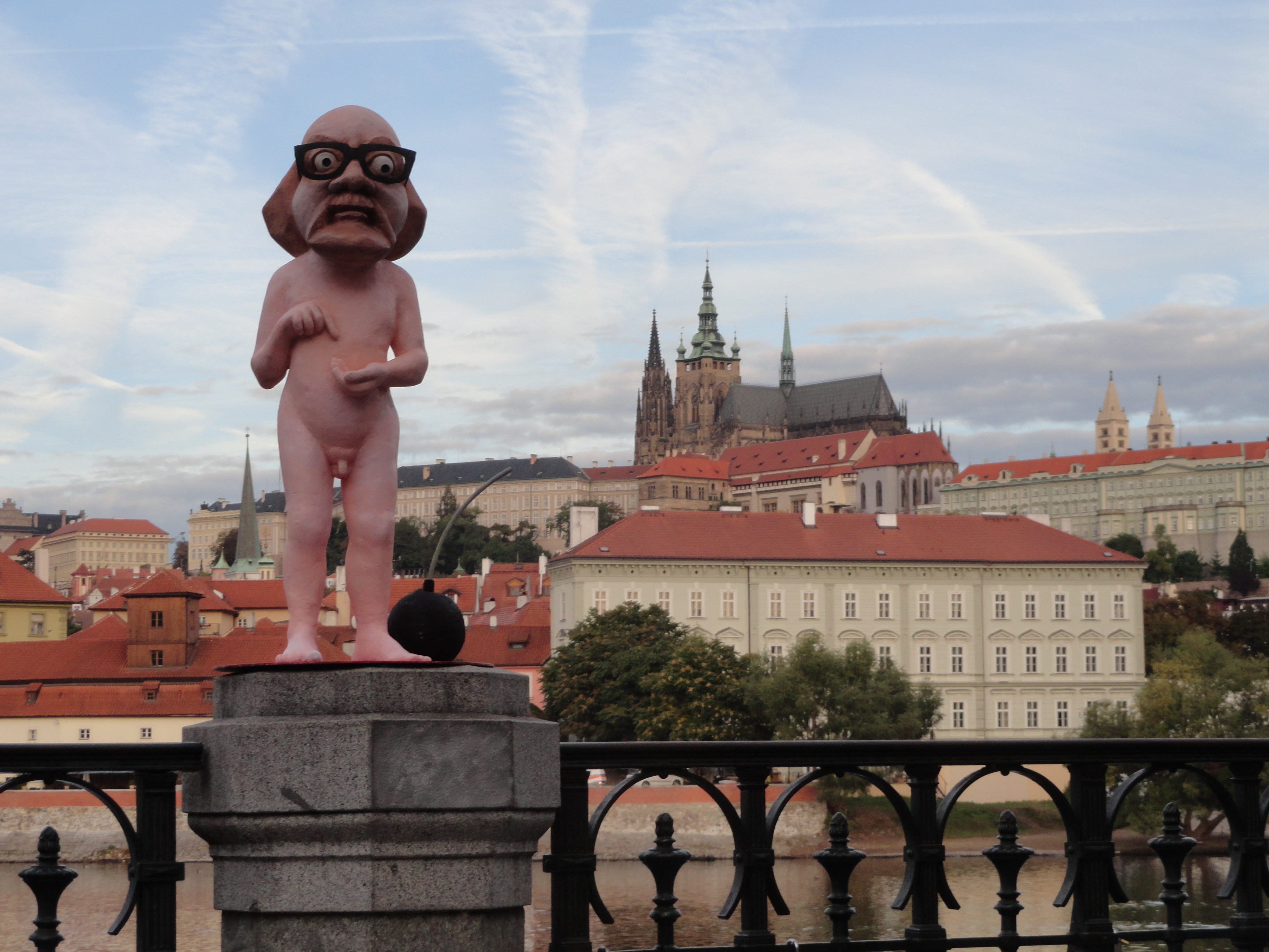 Włapko w Pradze